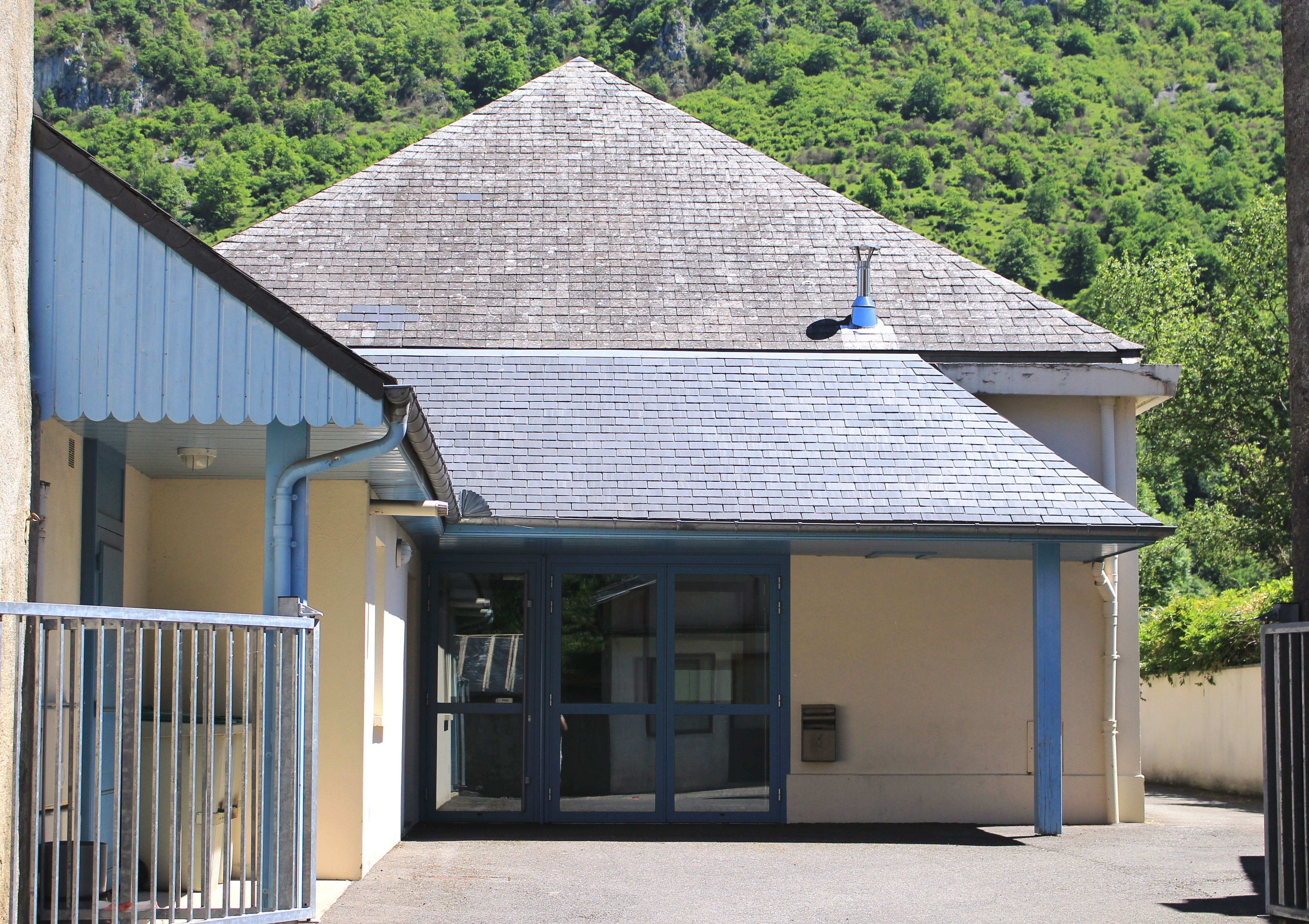 Salle des fêtes de Beaudéan (Hautes-Pyrénées)